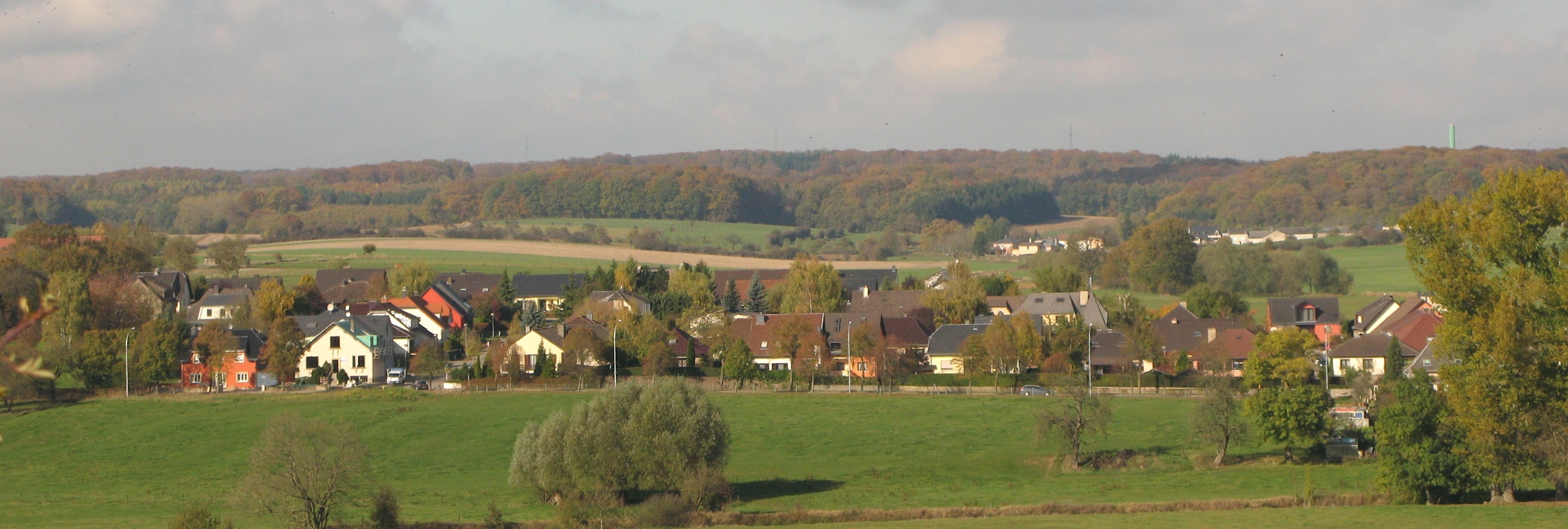 Fenneng vu Süde gesinn (2008). Fenneng Fenneng